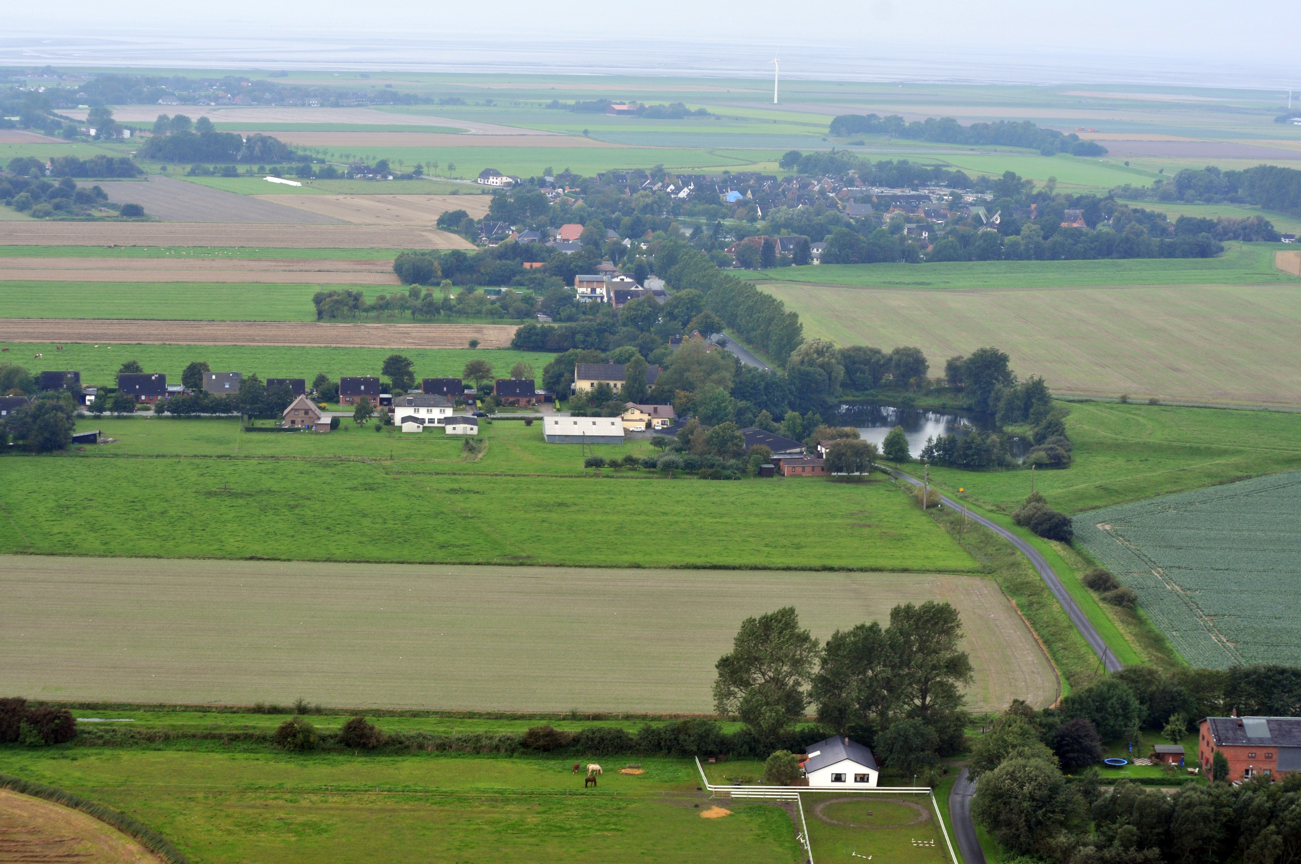 Fotoflug 4. Sept. 2011; Westerdeichstrich, Kreis Dithmarschen, Schleswig-Holstein, Deutschland; rechts z.T. Gemeindefläche von Hedwigenkoog, im Hintergrund die Nordseeküste Dieses Foto entstand aufgrund eines Projektes, das von Wikimedia Deutschland e. V. gefördert wurde. Im Rahmen des „Community-Projektbudgets“ sollen Luftbilder u.a. von Inseln, Halligen, Sanden und Küstenorten der deutschen Nordseeküste angefertigt werden. Das Projekt „Fotoflüge“ wurde im September 2011 begonnen.